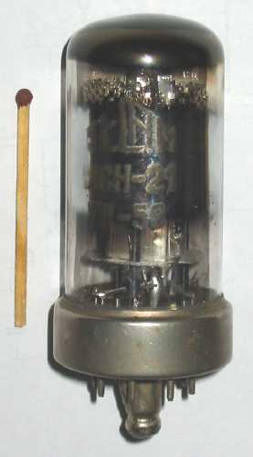 Heksoda z triodą